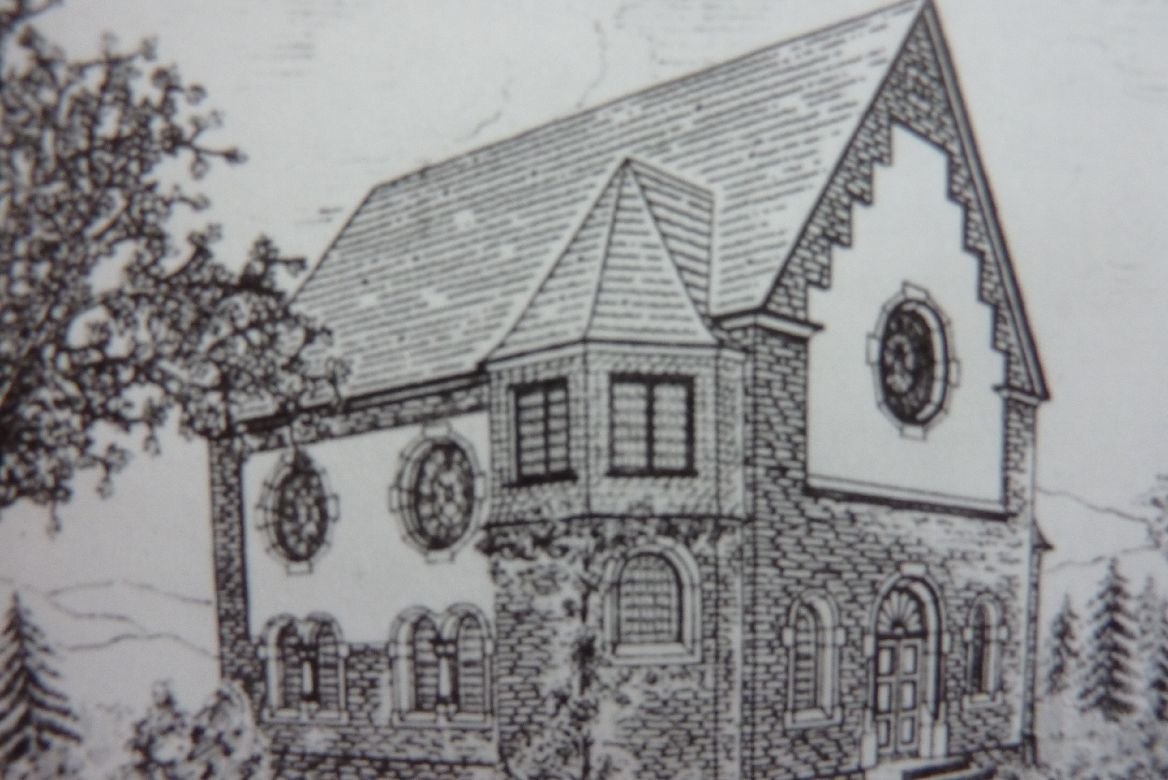 Synagoge von Leiwen an der Mosel, abgerissen